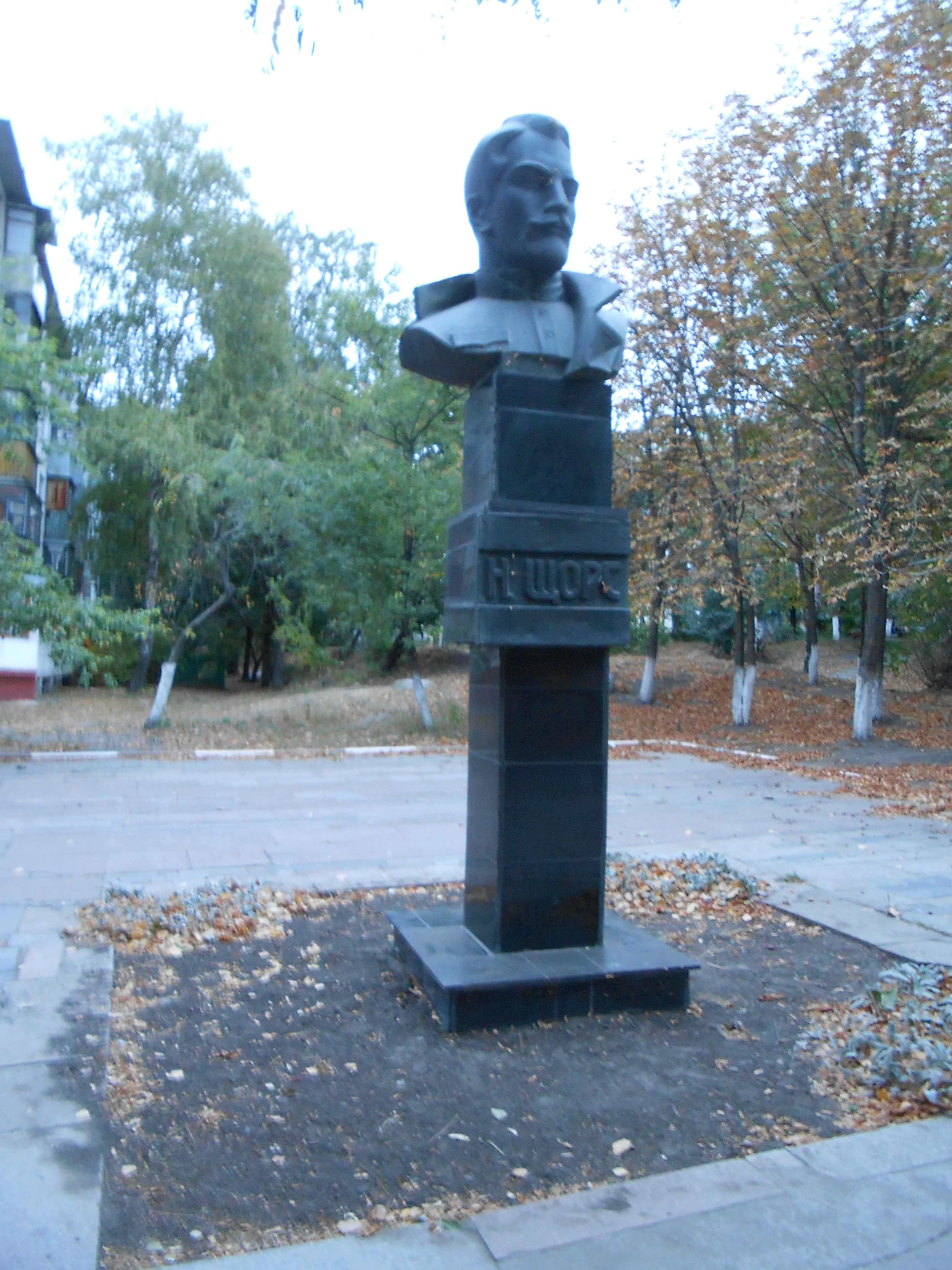 Памятный знак в честь Щорса Н.А.: улица Щорса, Белгород, Белгородская область